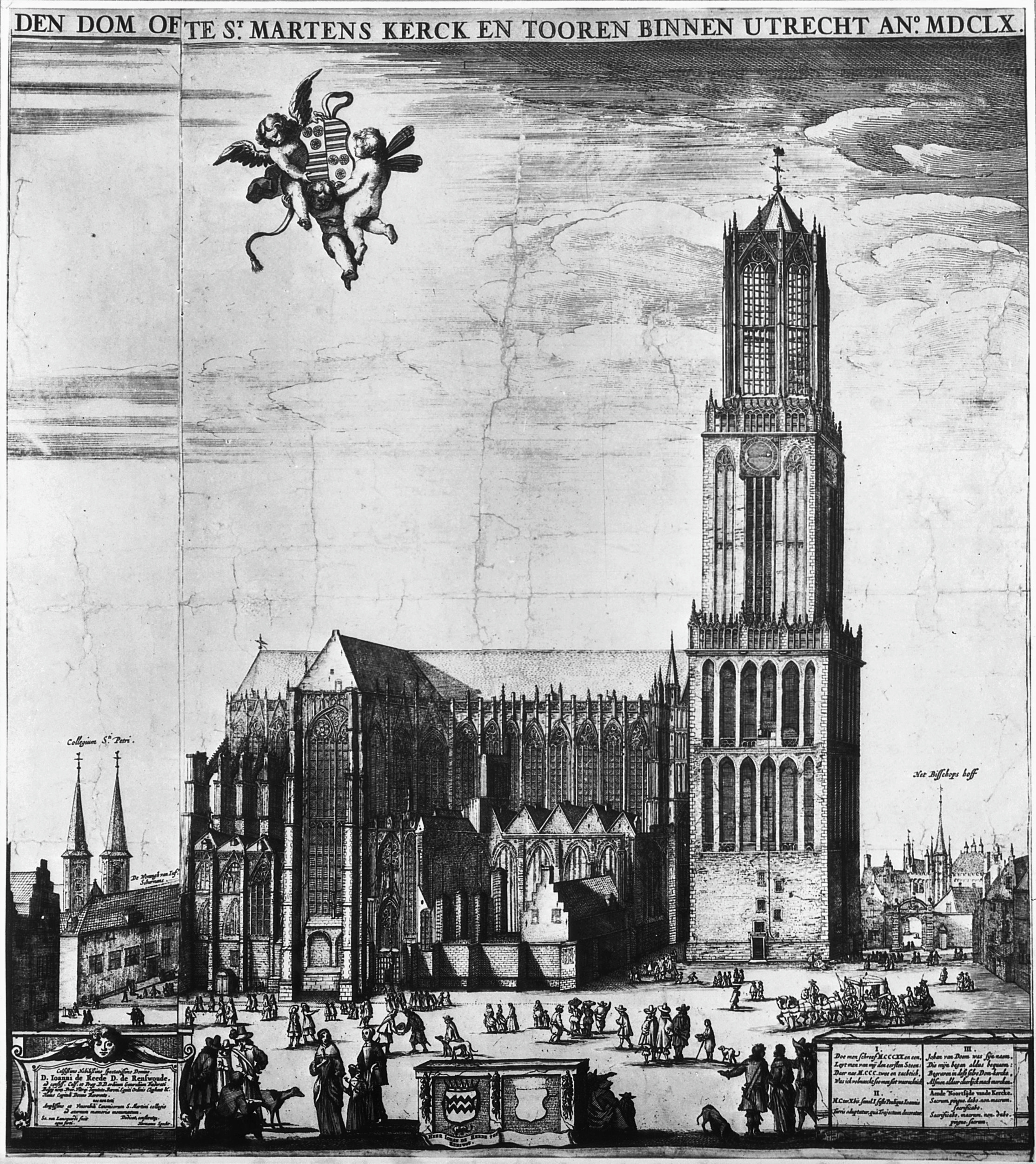 Domtoren En Kerk, Tekeningen: Dom, naar prent van Lamsweerde